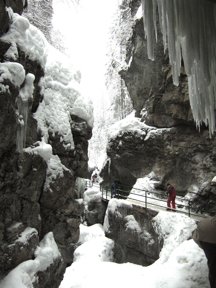 Breitachklamm Url